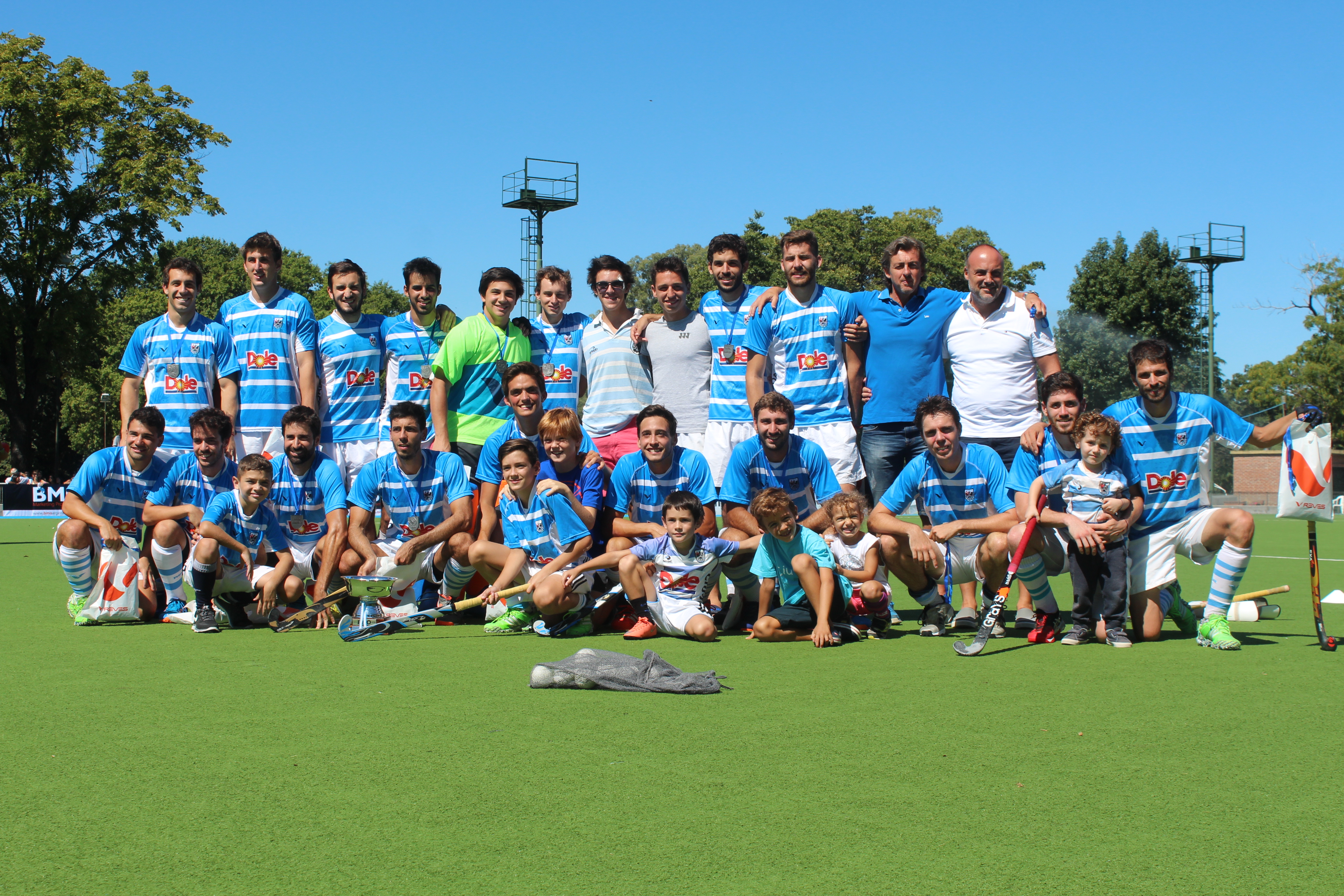 Ciudad 1A 2017